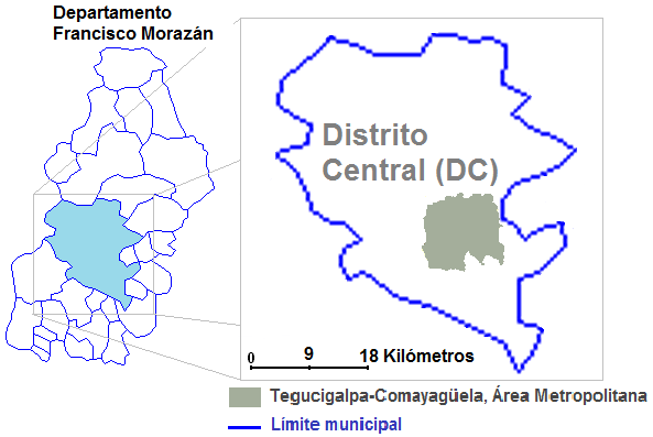 Área metropolitana de Tegucigalpa y Comyagua